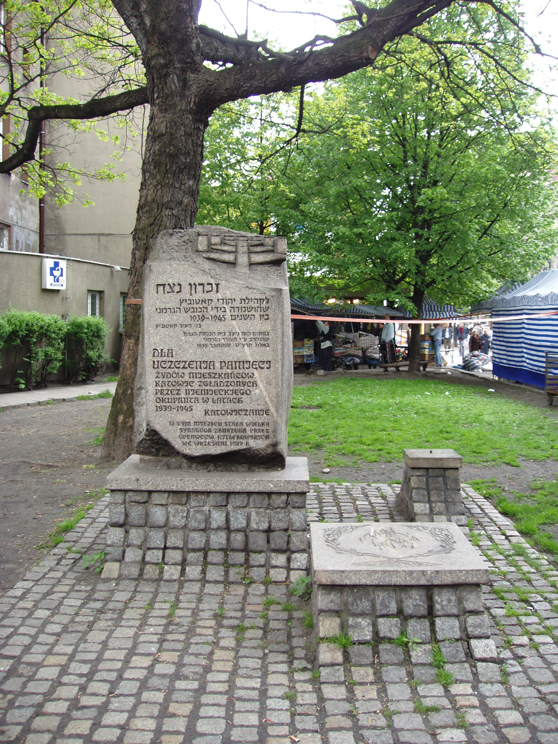 Pomnik upamiętniający żydowskich mieszkańców Katowic zgładzonych przez Niemców w okresie II wojny światowej. Pomnik ten został postawiony w miejscu gdzie niegdyś stałą synagoga żydowska, również zburzona podczas okupacji.